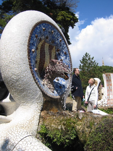 Figura de piezas de cerámica en la escalinata principal del Parc Güell, Barcelona